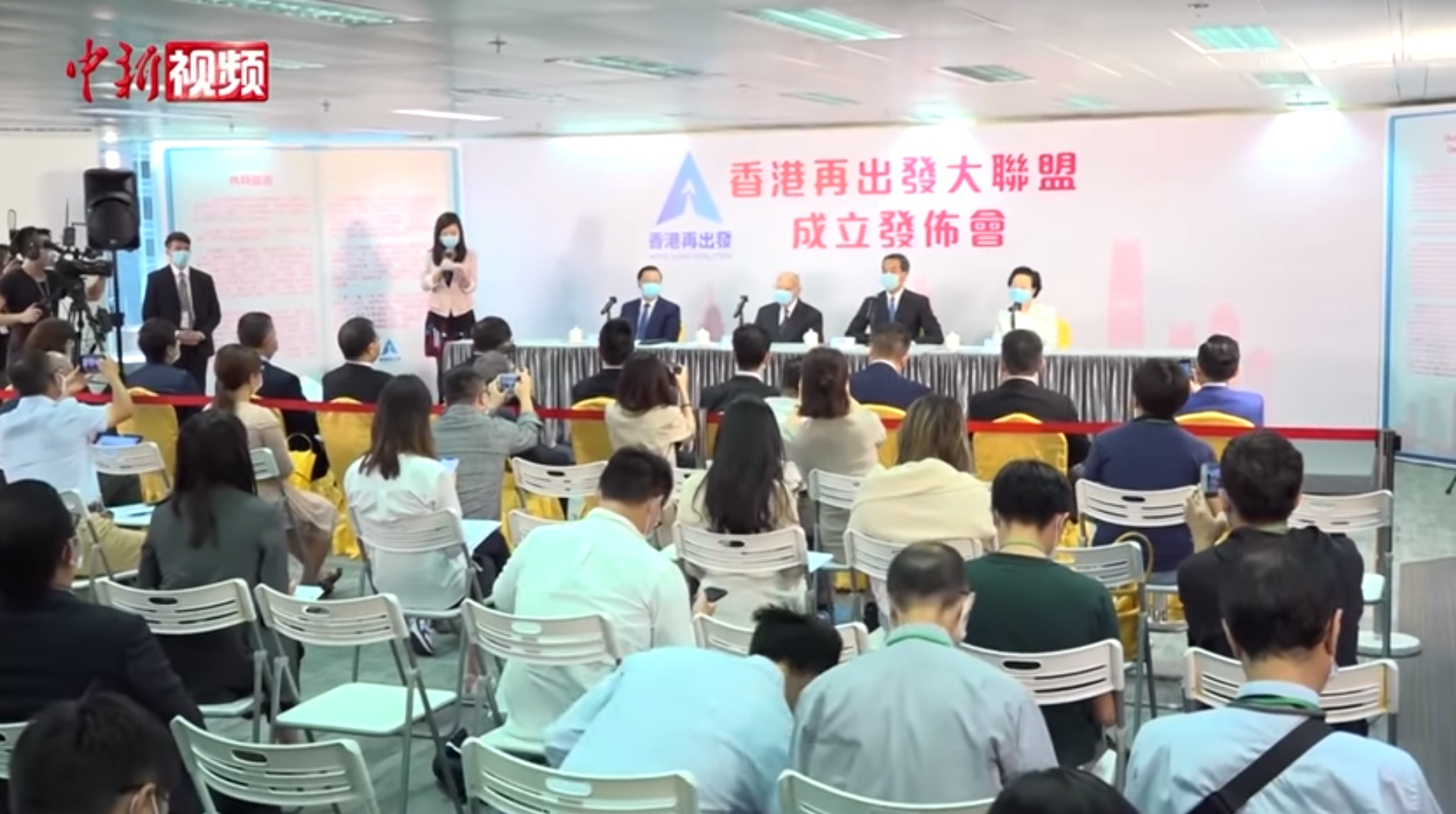 5月5日，由全国政协副主席董建华、全国政协副主席梁振英担任总召集人的"香港再出发大联盟"宣告正式成立